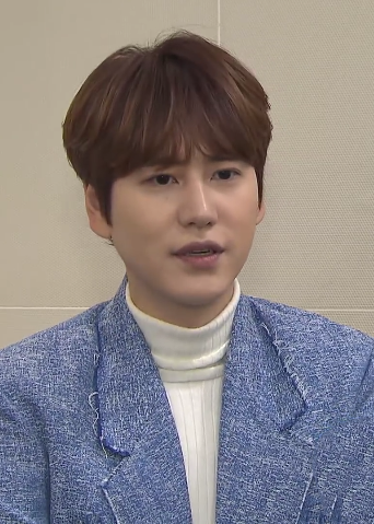 규현 새 노래 '블라블라' 인터뷰